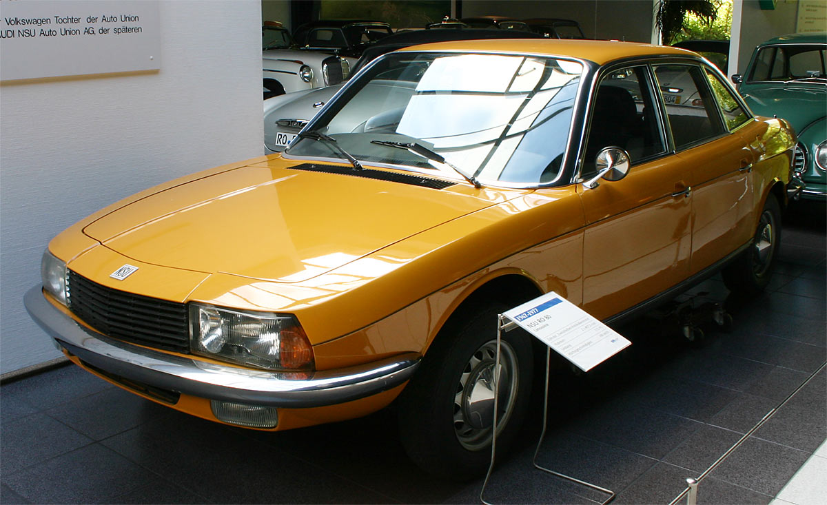 NSU Ro80